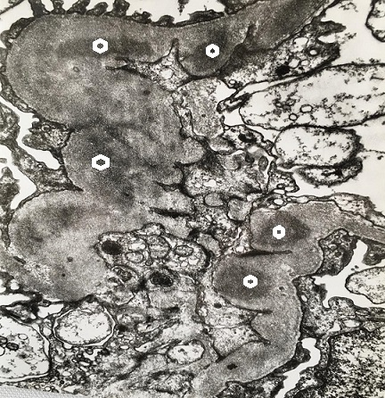 Tip III Aşırı duyarlılık: Böbrek dokusunda glomerülleri oluşturan kapiller damarların duvarlarındaki immun kompleksler (*)